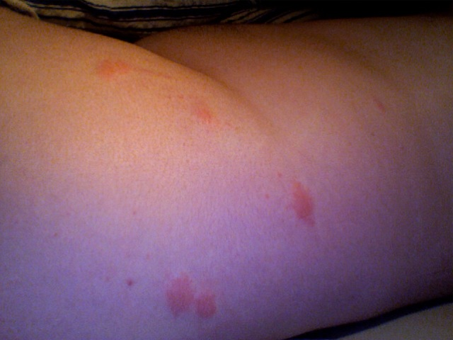 Person stukket av Regnklegg (Haematopota pluvialis)